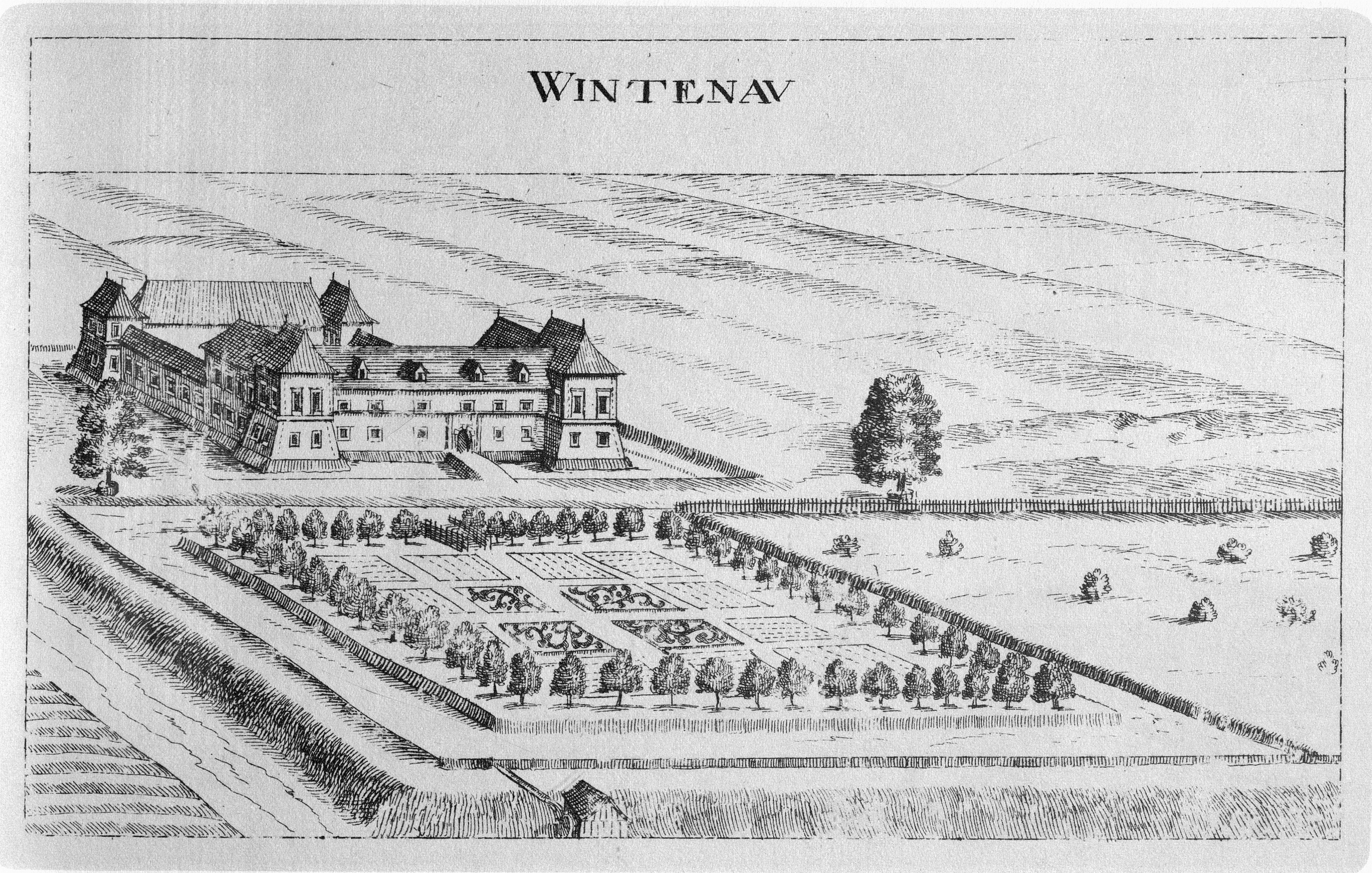 G. M. Vischers Käyserlichen Geographi, Topographia Ducatus Stiriae, Das ist: Eigentliche Delineation / und Abbildung aller Städte / Schlösser / Marcktfleck / Lustgärten / Probsteyen / Stiffter / Clöster und Kirchen / so es sich im Herzogthumb Steyrmarck befinden; Und anjetzo Umb einen billichen Preyß zu finden seynd Bey Johann Bitsch Universitäts Buchhandlern / Auff dem Juden=Platz bey der guldenen Saulen. Graz 1681 Die Nummerierung der Dateien folgt der alphabetischen Reihung der Ortsnamen und entspricht nicht dem Vischer-Register